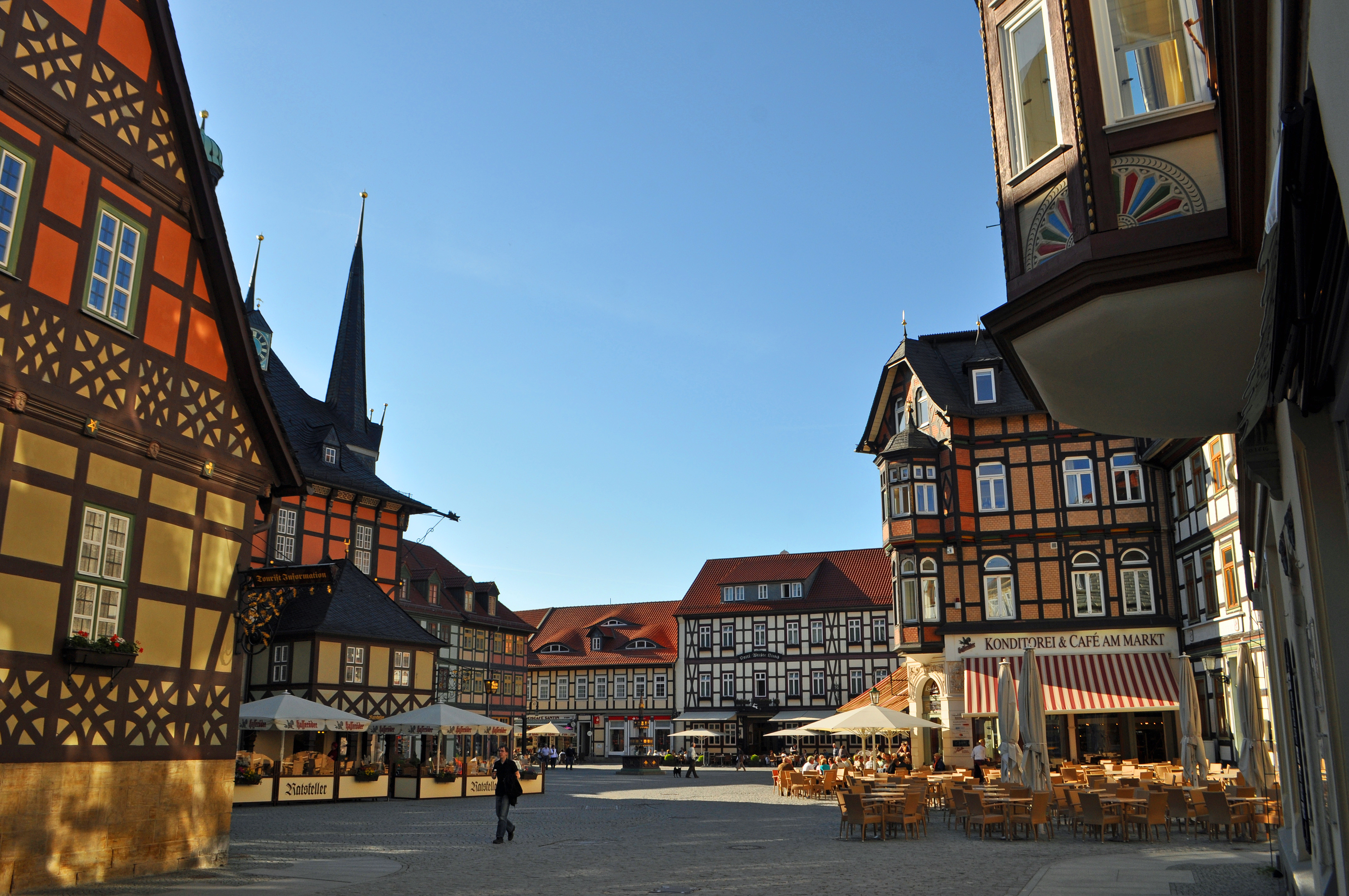 Blick von der Marktstraße auf den Marktplatz in Wernigerode